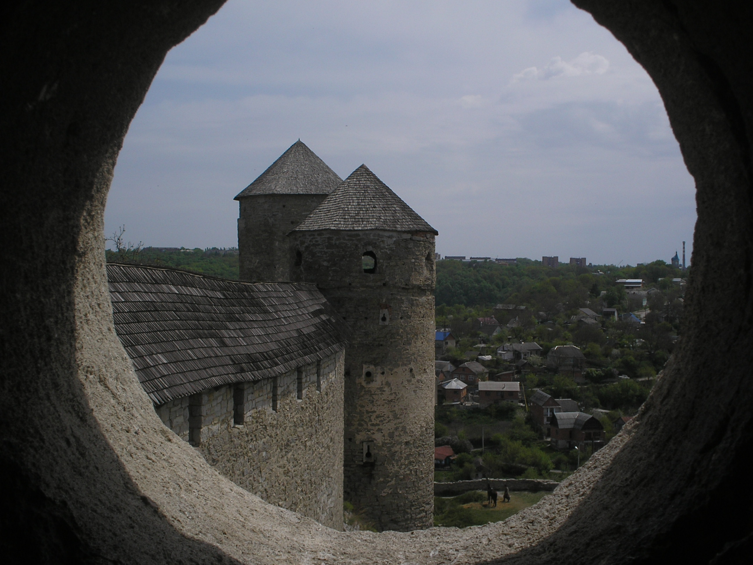 Башта Ковпак з Папською.